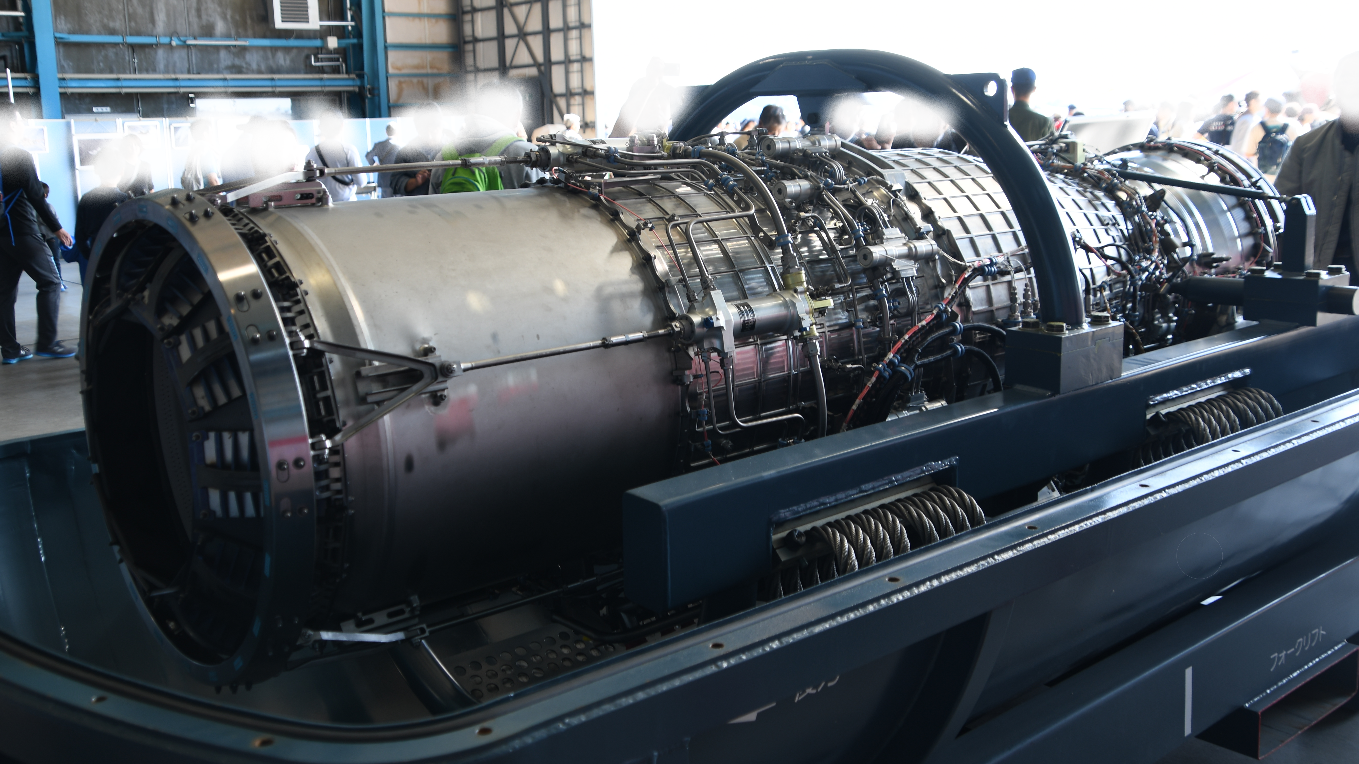 石川島播磨重工業（現：IHI） XF5-1ターボファン・エンジン 右後部。2019年11月10日 航空自衛隊岐阜基地にて。